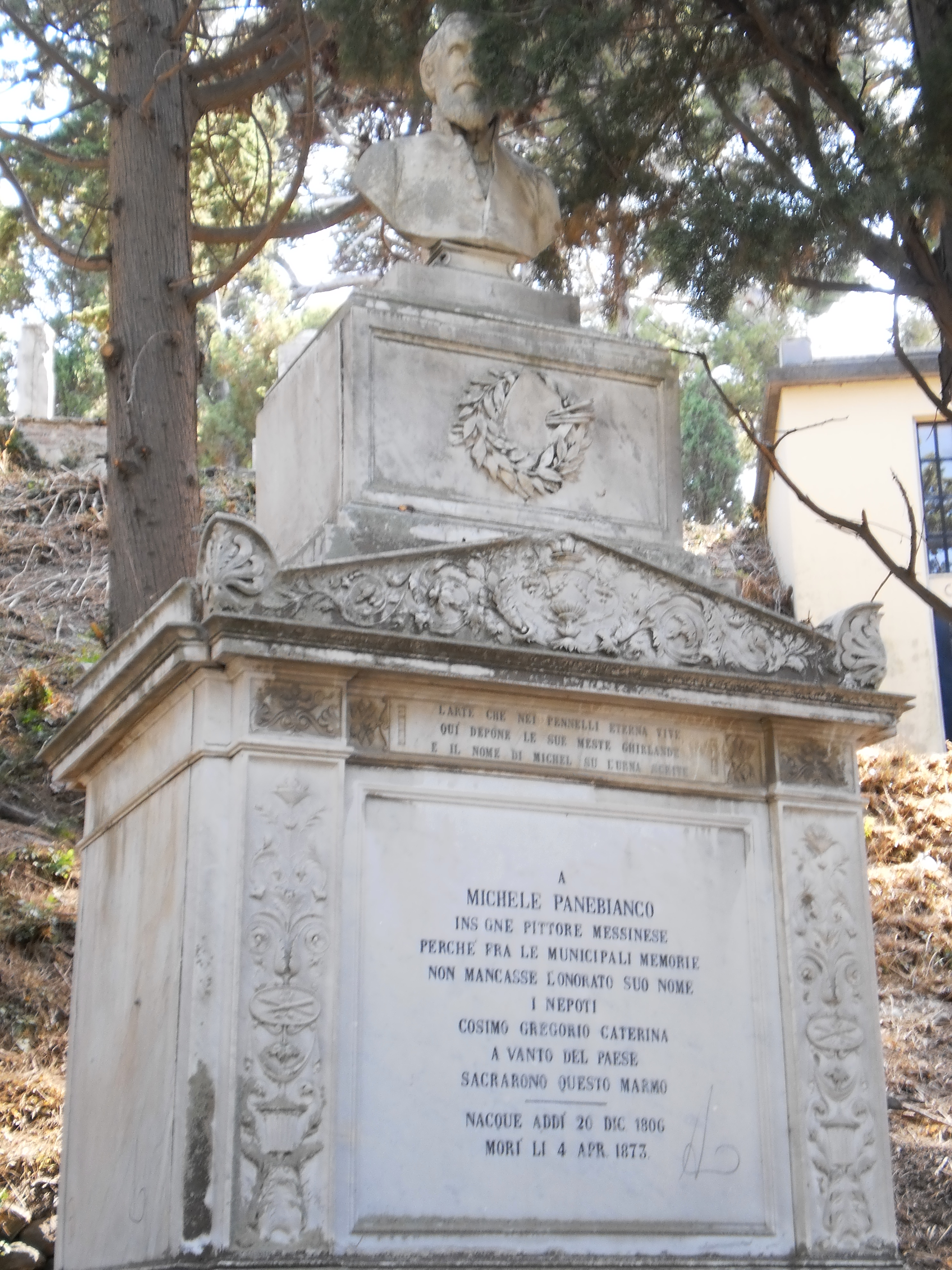 Tomba di Michele Panebianco Messina..